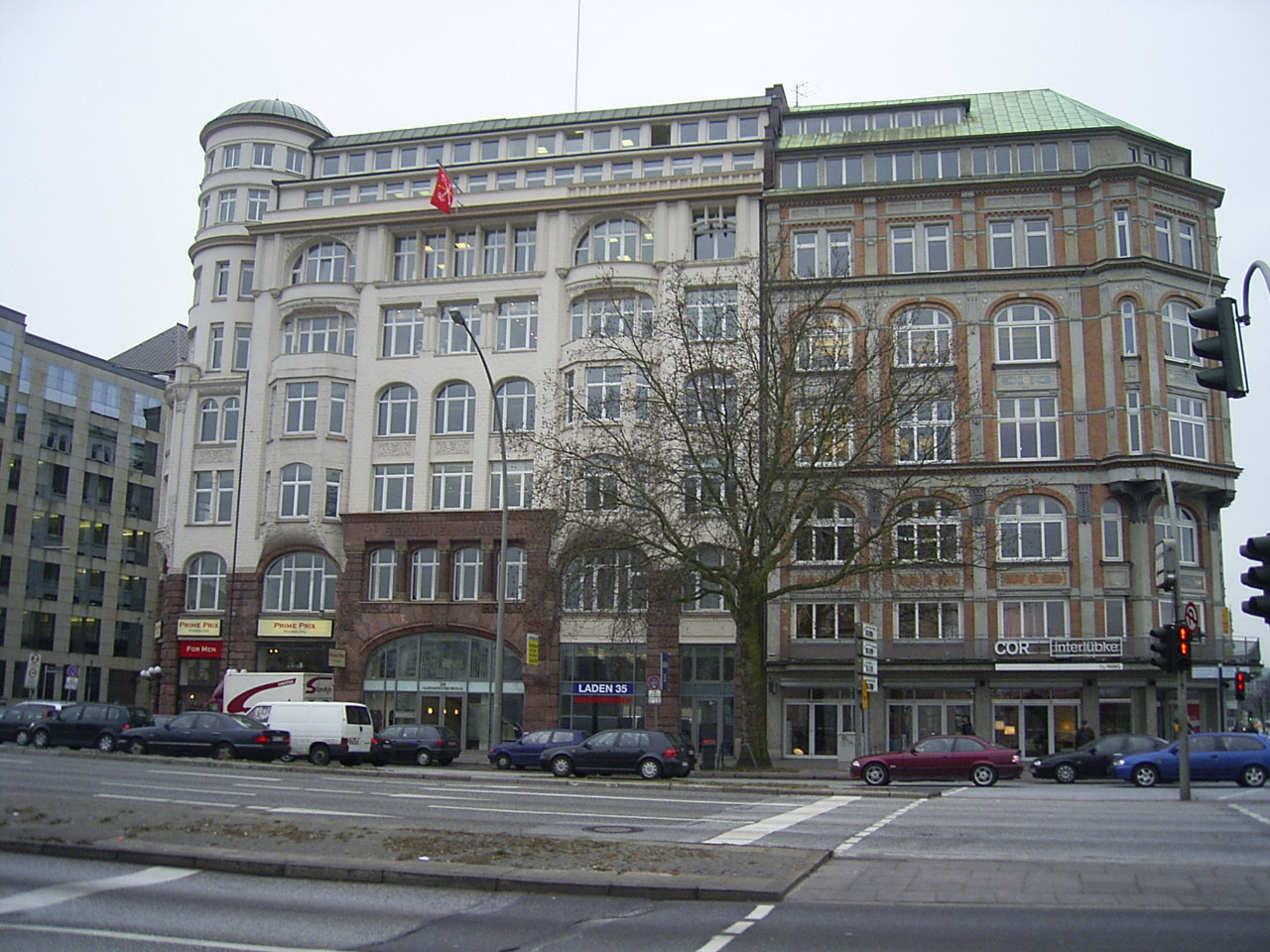 Das Scholvienhaus (links) an der Ecke Glockengießerwall 26 / Ferdinandstraße 2a wurde 1904/05 von Lundt & Kallmorgen im Stile der Werksteinarchitektur des Amerikaners Henry Hobson Richardson erbaut. Rechts anschließend steht das Kontorhaus Alsterblick an der Straßenecke Glockengießerwall / Ballindamm 1. Es wurde 1899/1900 von Rambatz & Jollasse entworfen und hebt sich in seiner Farbigkeit deutlich von den Nachbarhäusern ab.